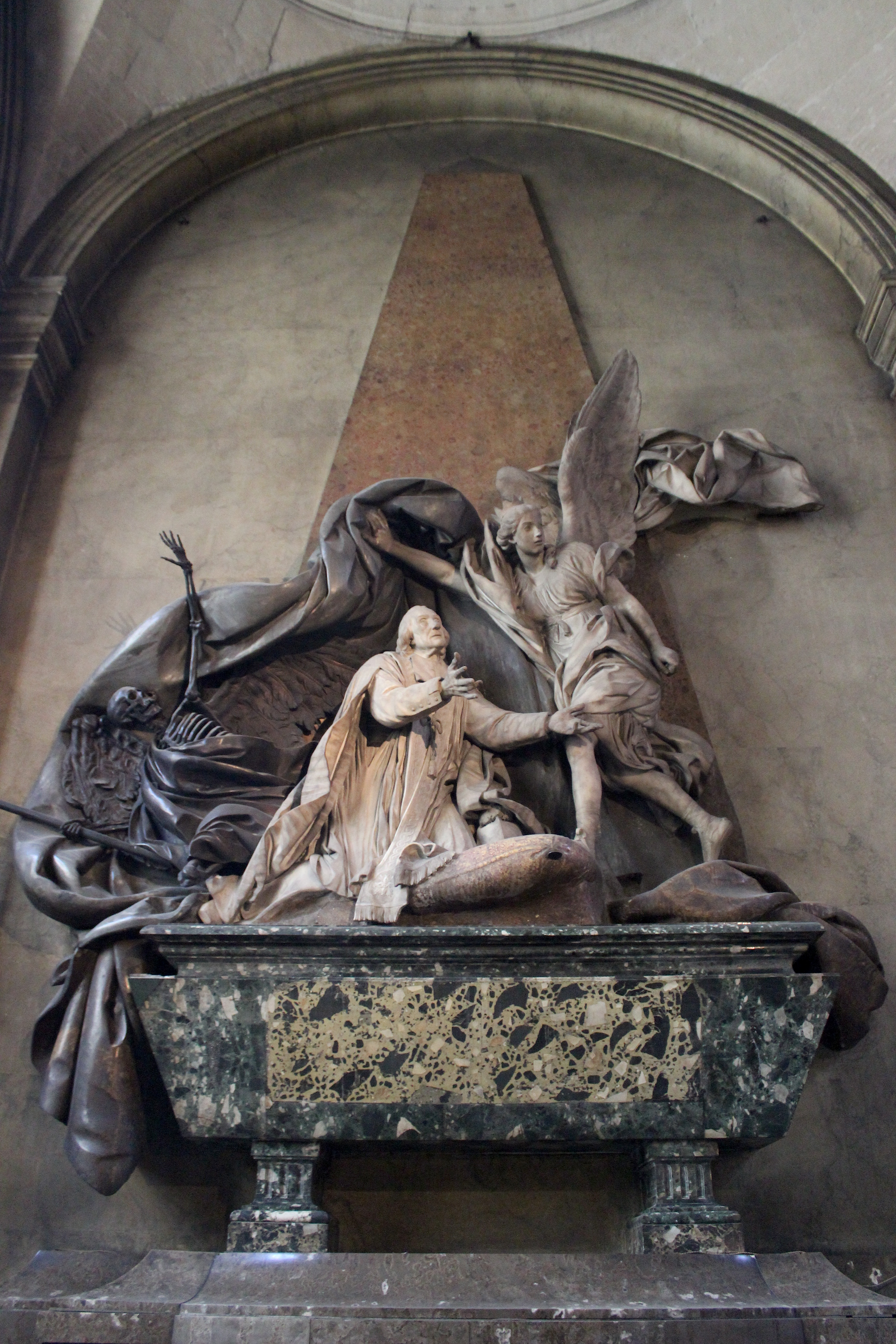 París, Saint Sulpice. Monumento a Jean-Baptiste Languet de Gergy.